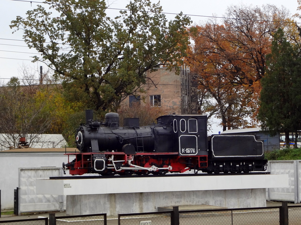 Паровоз, установленный на платформе станции Боярка